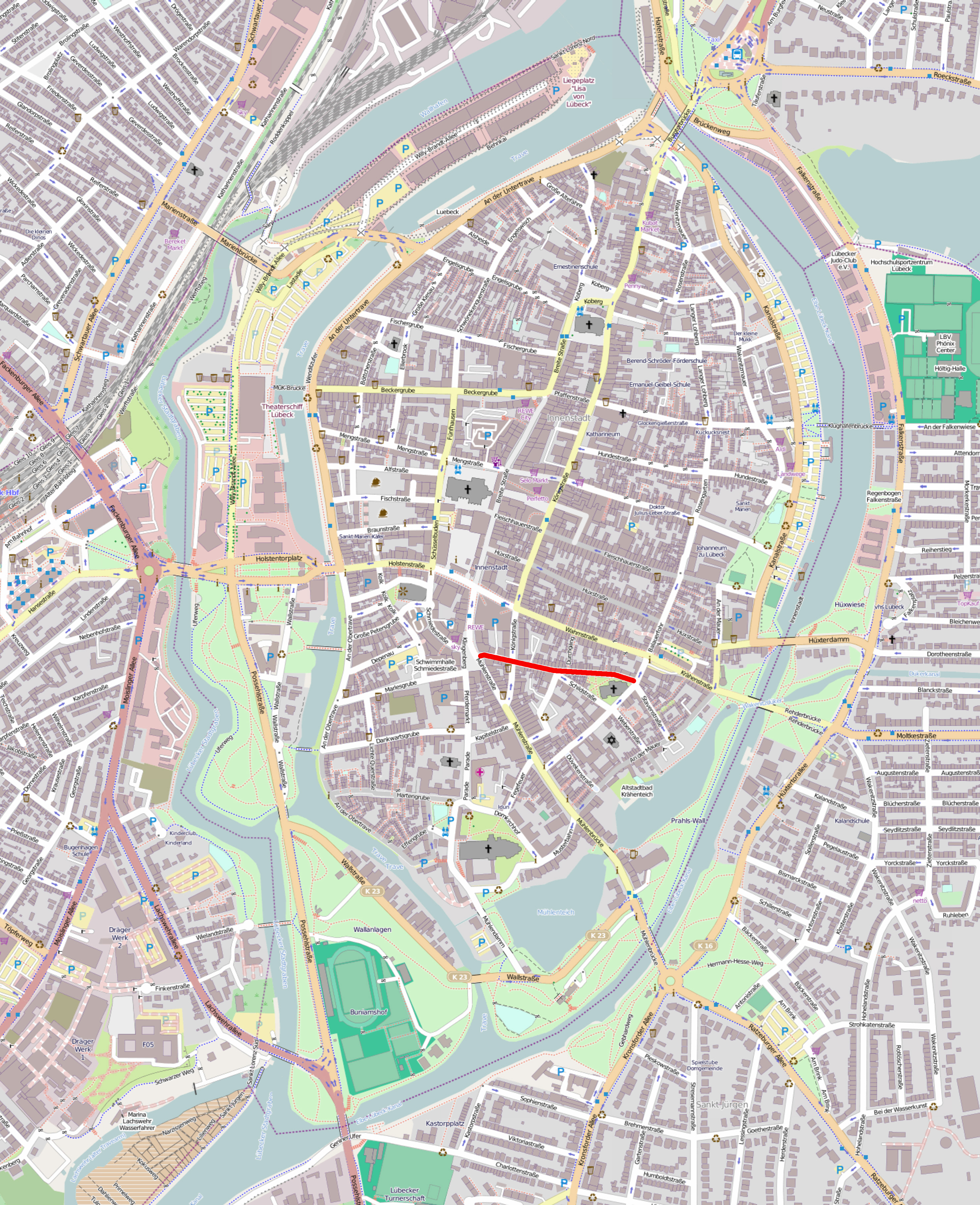 Die Aegidienstraße in Lübeck, rot markiert auf einer OpenStreetMap-Karte